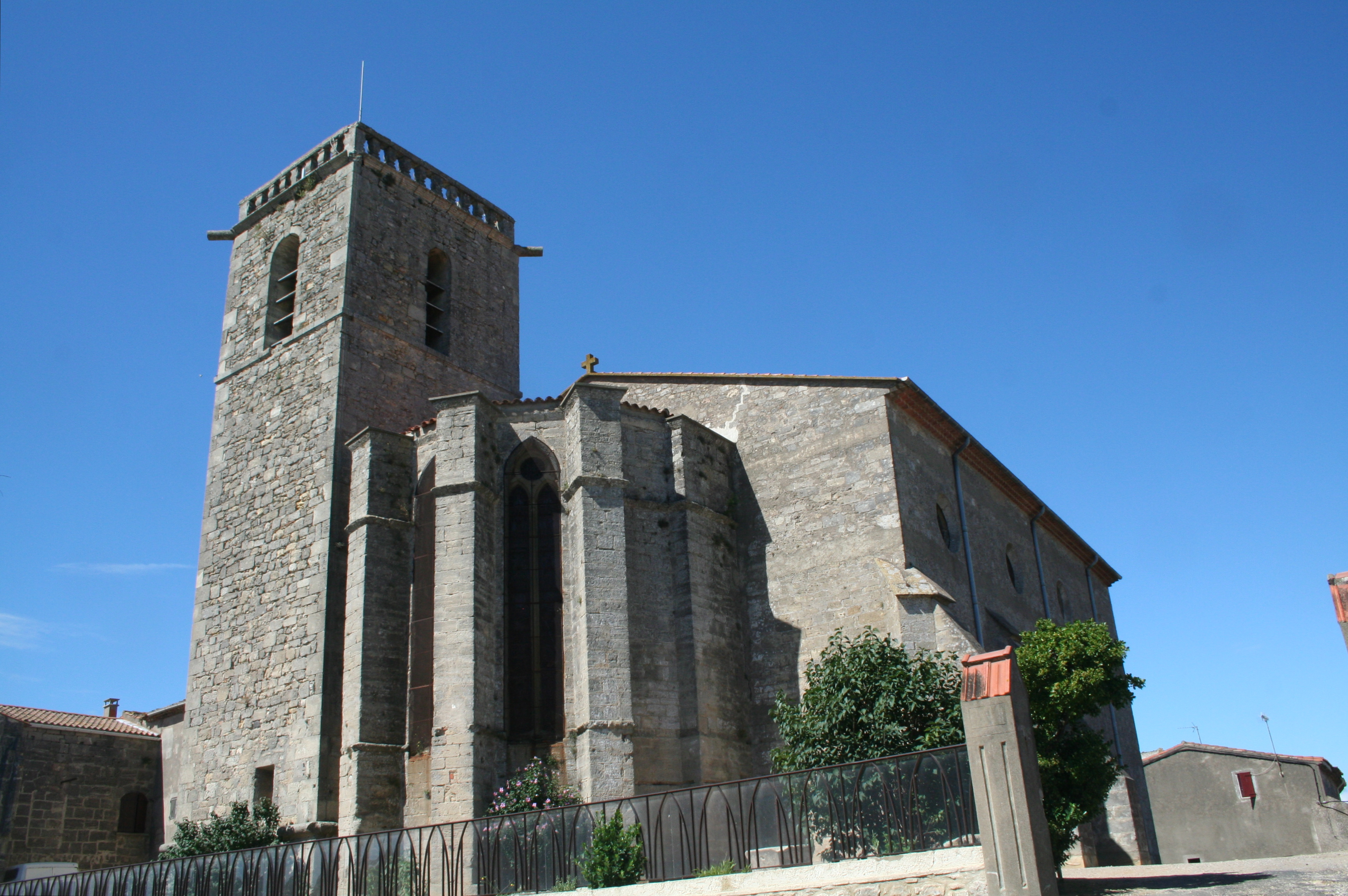 Vendres (Hérault) - église Saint-Étienne (XIVe siècle).